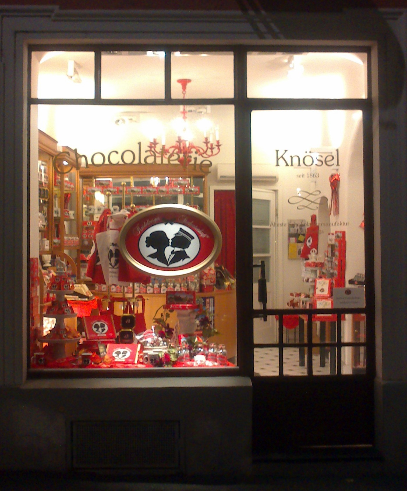 Heidelberg, Café Knösel: Schaufensterdekoration mit Heidelberger Studentenkuß.